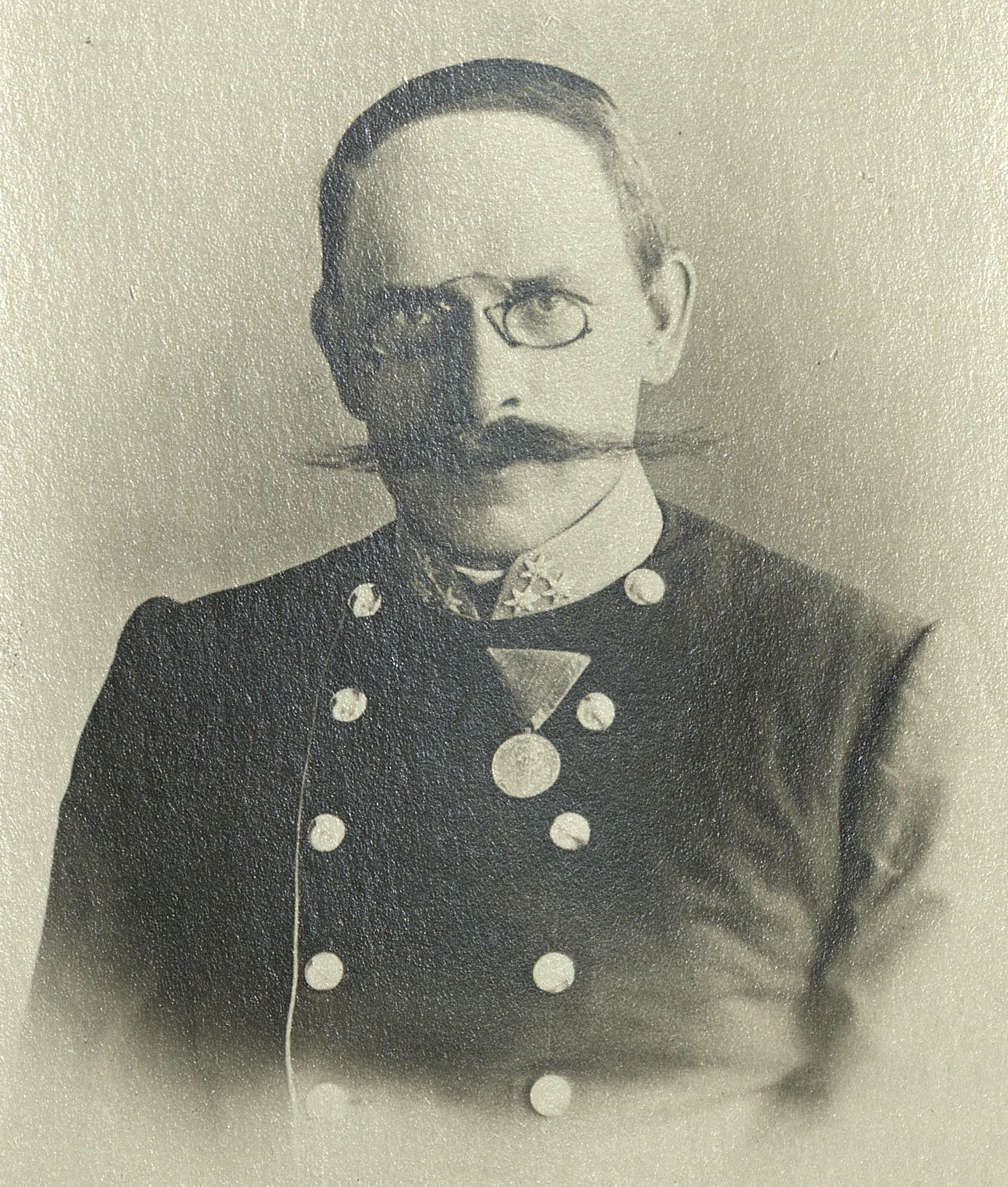 Fran Maselj - Podlimbarski (1852-1917), Slovene writer and officer.